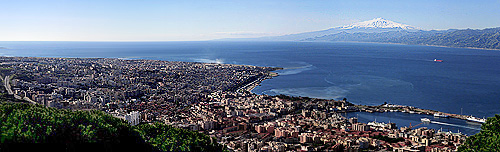 Reggio Calabria, panorama dal fortino della collina di Pentimele Foto concessa dall'Autore - Saverio Autellitano, - purchè se ne citi e se ne riconosca la paternità anche su opere derivate.